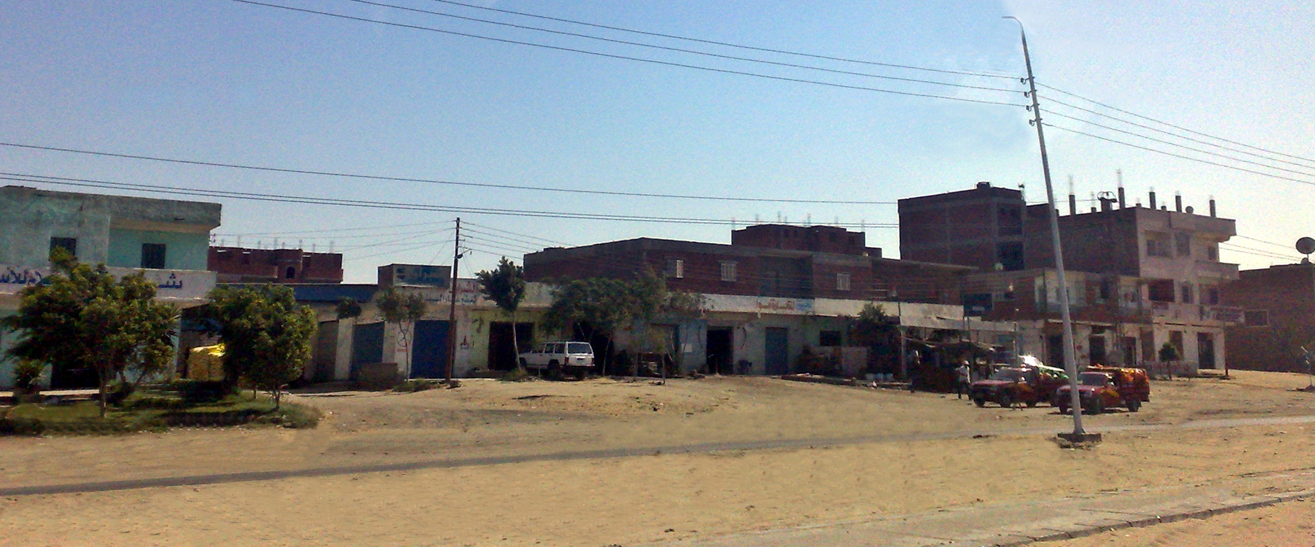 قرية كفر داود الجديدة، مركز السادات